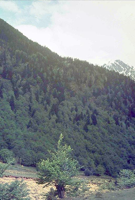 La transición entre el bosque de caducifolias (o latifolias, es decir, árboles de hoja ancha) y las coníferas puede verse nítidamente en esta imagen tomada en 1978 en el Valle de Boí, específicamente en Caldes de Boí. Los árboles de hoja ancha solo alcanzan cierta altura máxima en las laderas montañosas a partir de la cual son sustituidos por coníferas.